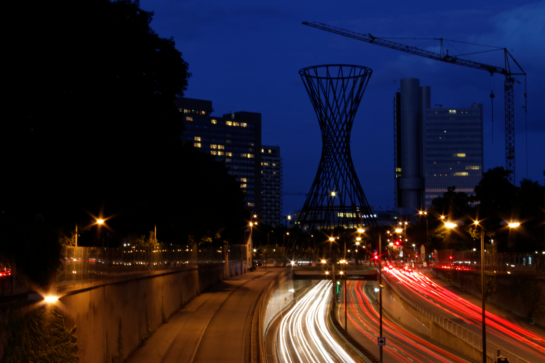 München, Effnerplatz mit Mae West und Einfahrt in den Effnertunnel